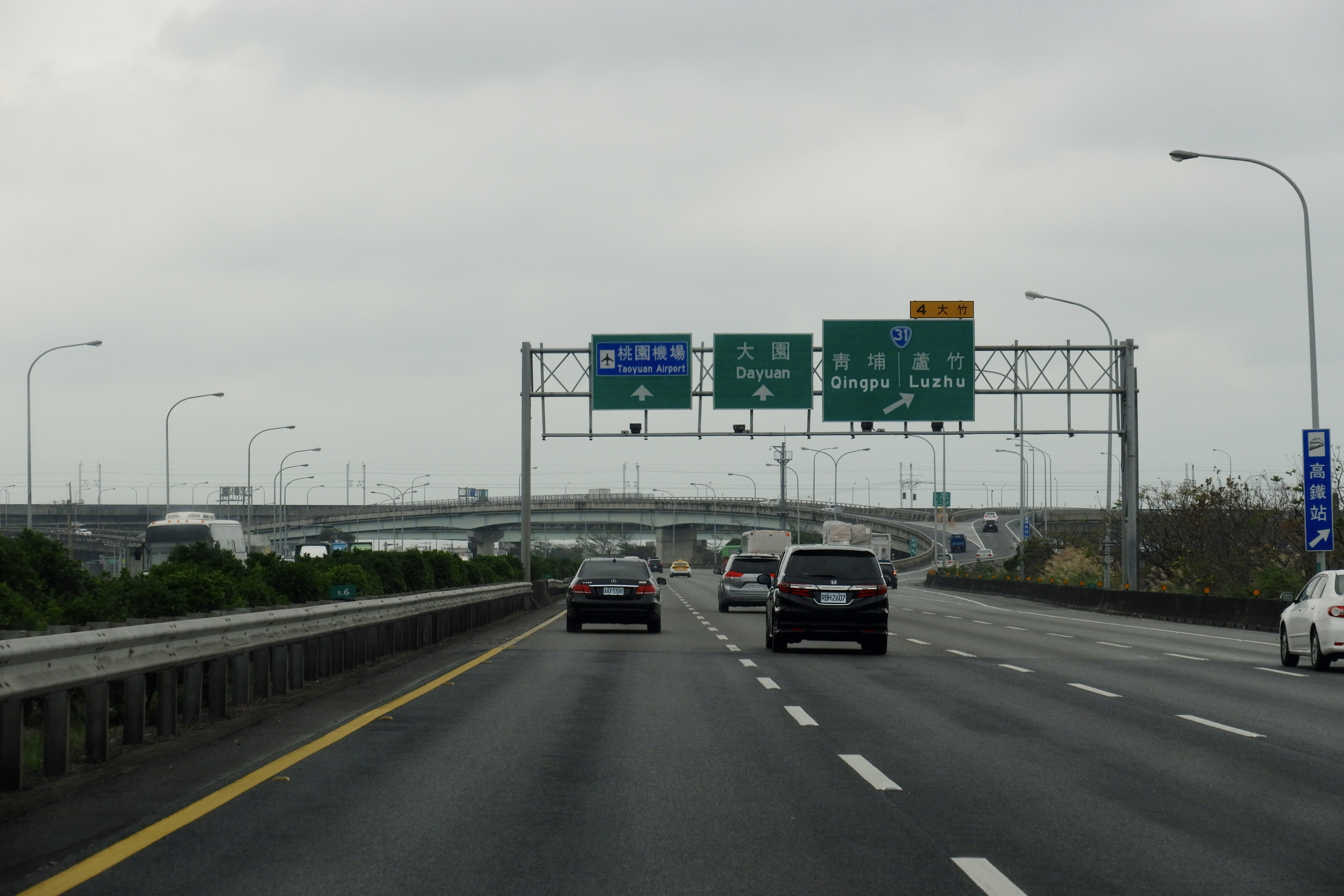 國道二號 (中華民國) 靠近大竹交流道。